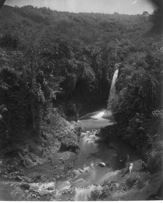 Foto. Een waterval in de buurt van Bandung